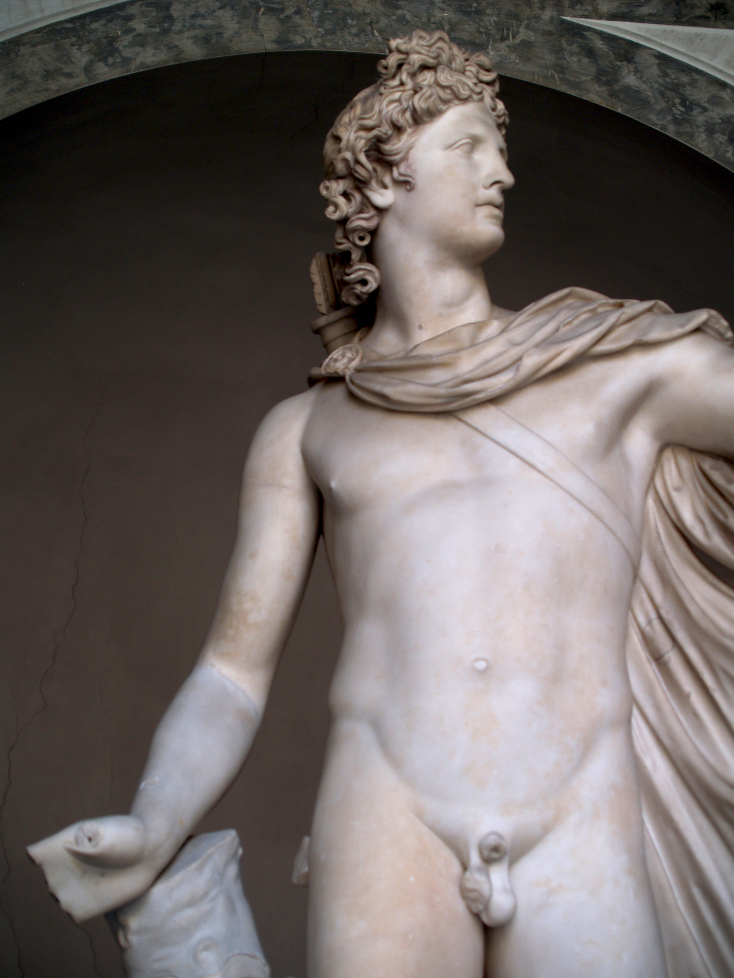 Museos Vaticanos. Apolo del Belvedere.